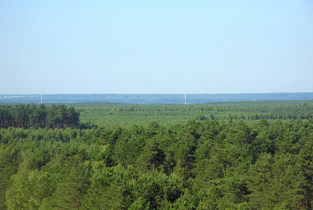 Puszcza Bydgoska - widok ze szczytu wydmy na północ (dolinę Wisły)